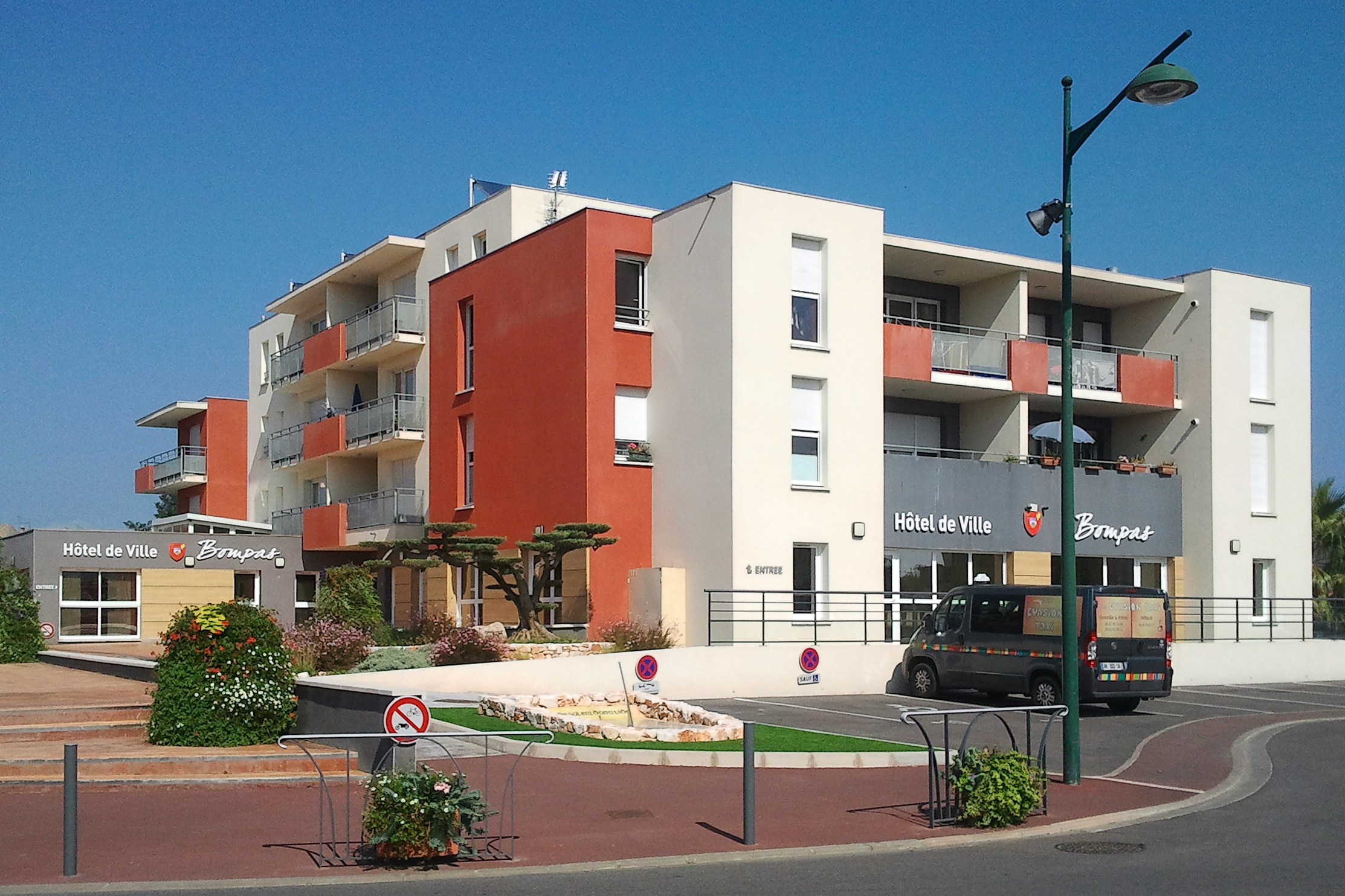 Mairie de Bompas